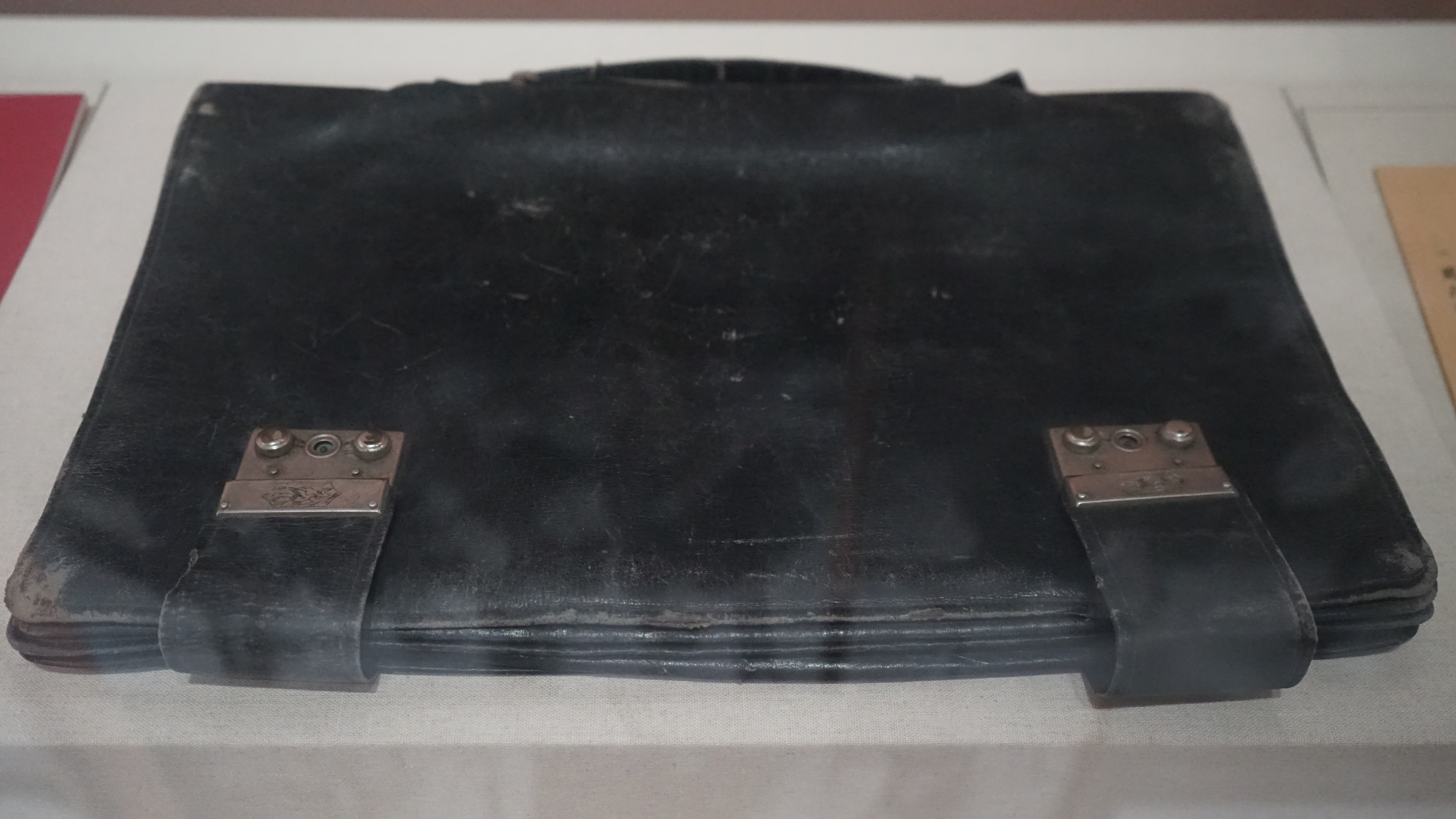 中文（中国大陆）: 王若飞参加重庆谈判时使用的公文包。一级文物。